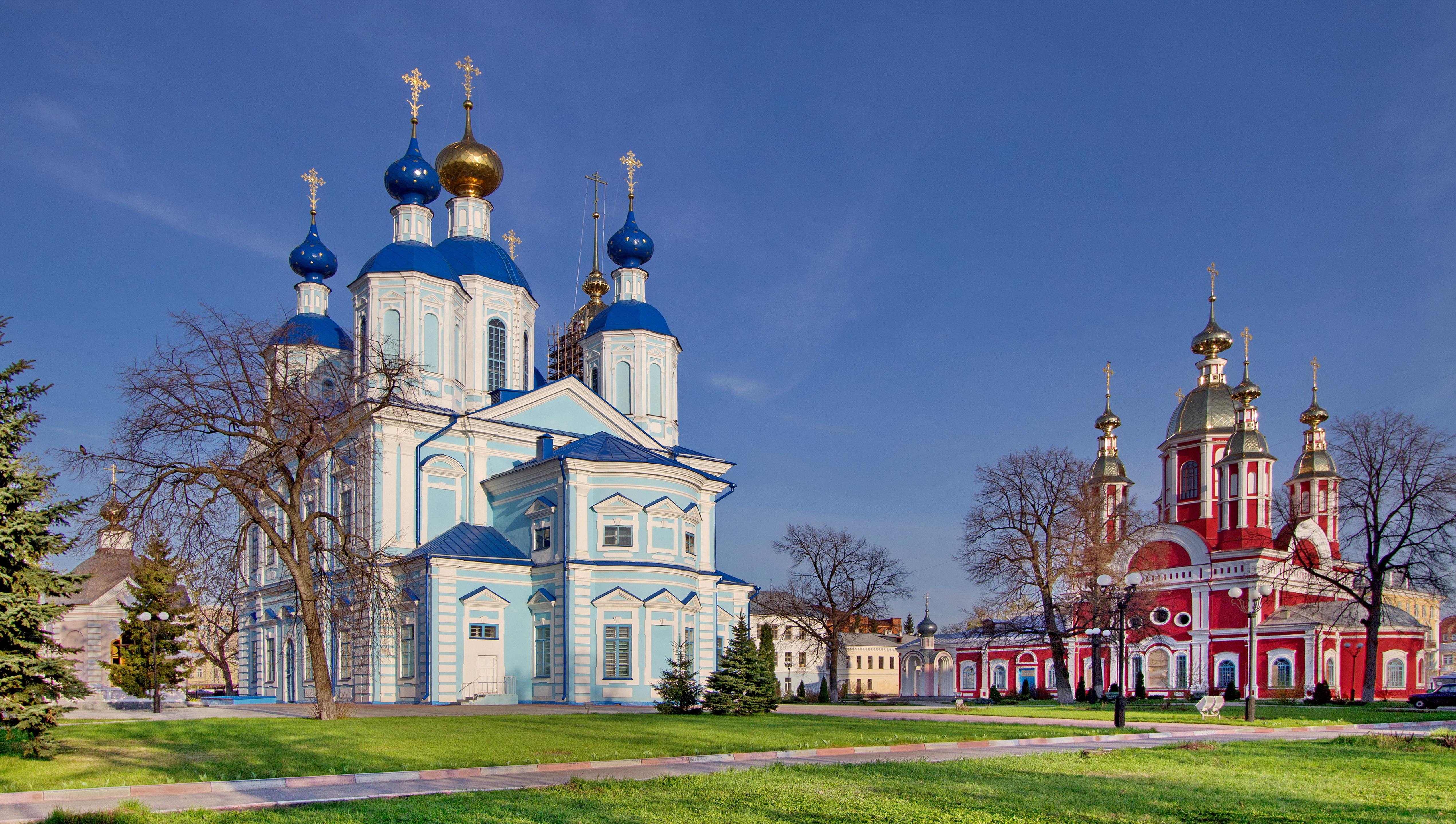 Казанский Богородичный мужской монастырь в Тамбове. Общий вид на Казанскую и Иоанно-Предтеченскую церкви.